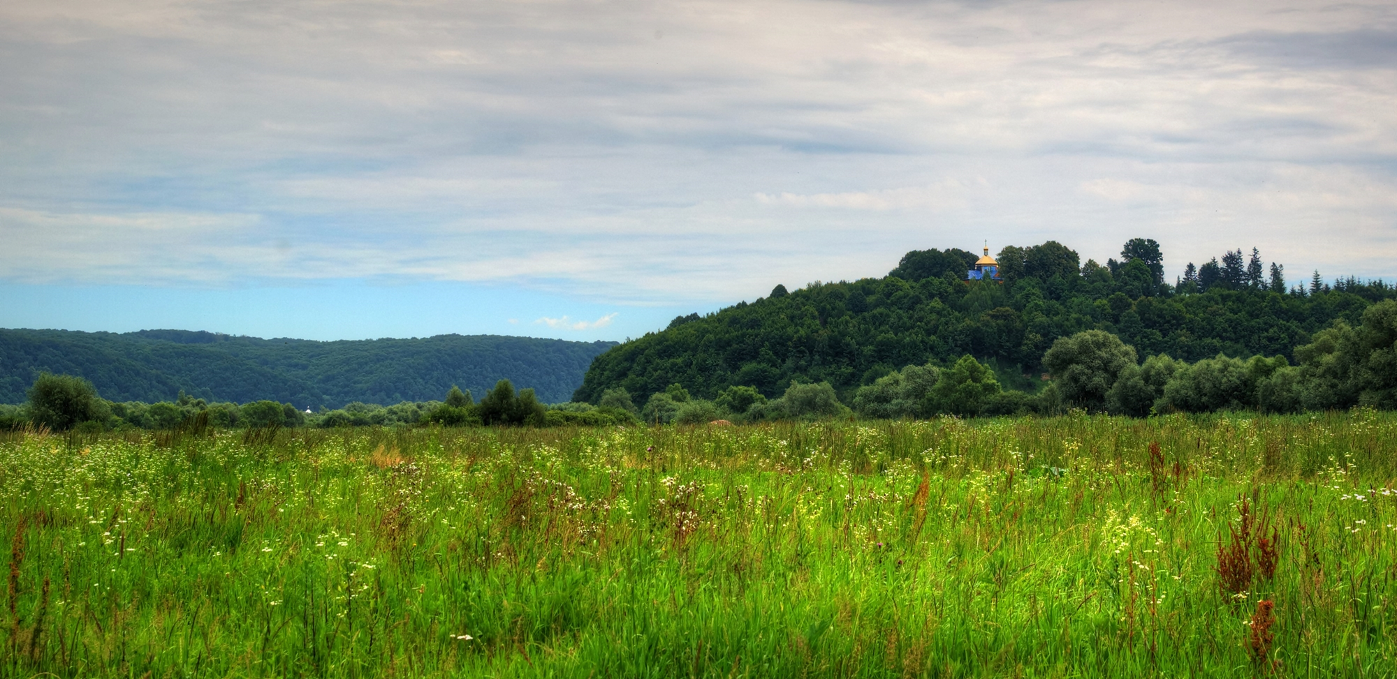 Старе Село Жидачівський район